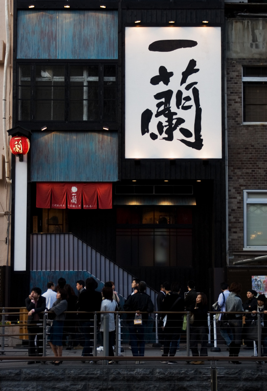 一蘭ラーメン店（大阪市中央区宗右衛門町7-18、「一蘭」道頓堀店[1]）